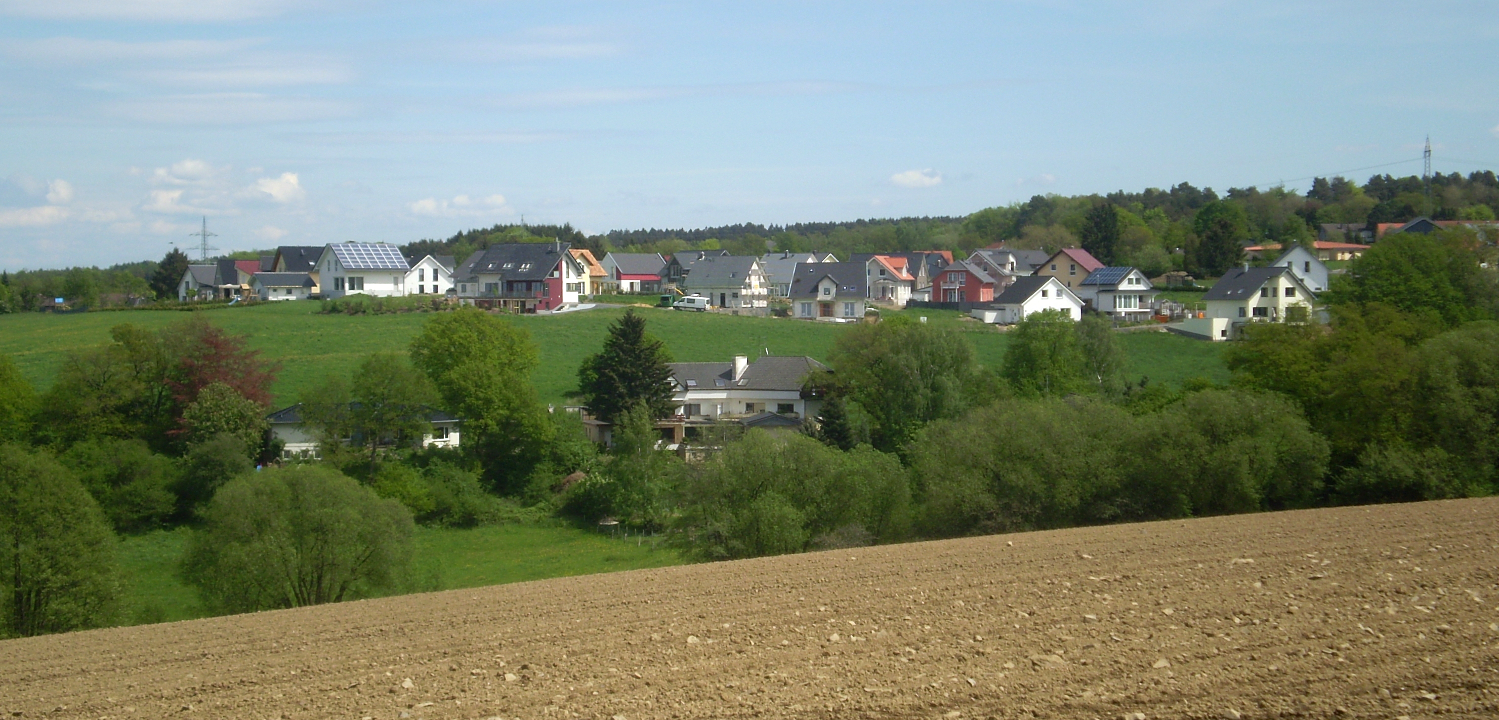 Höhe, Aegidienberg, Stadt Bad Honnef